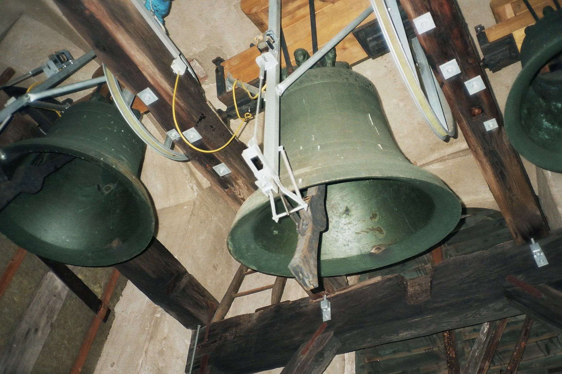 Beschreibung: Große Glocke (f1) mit Klöppelfänger in der ev. Kirche zu Feld am See (Österreich/Kärnten).